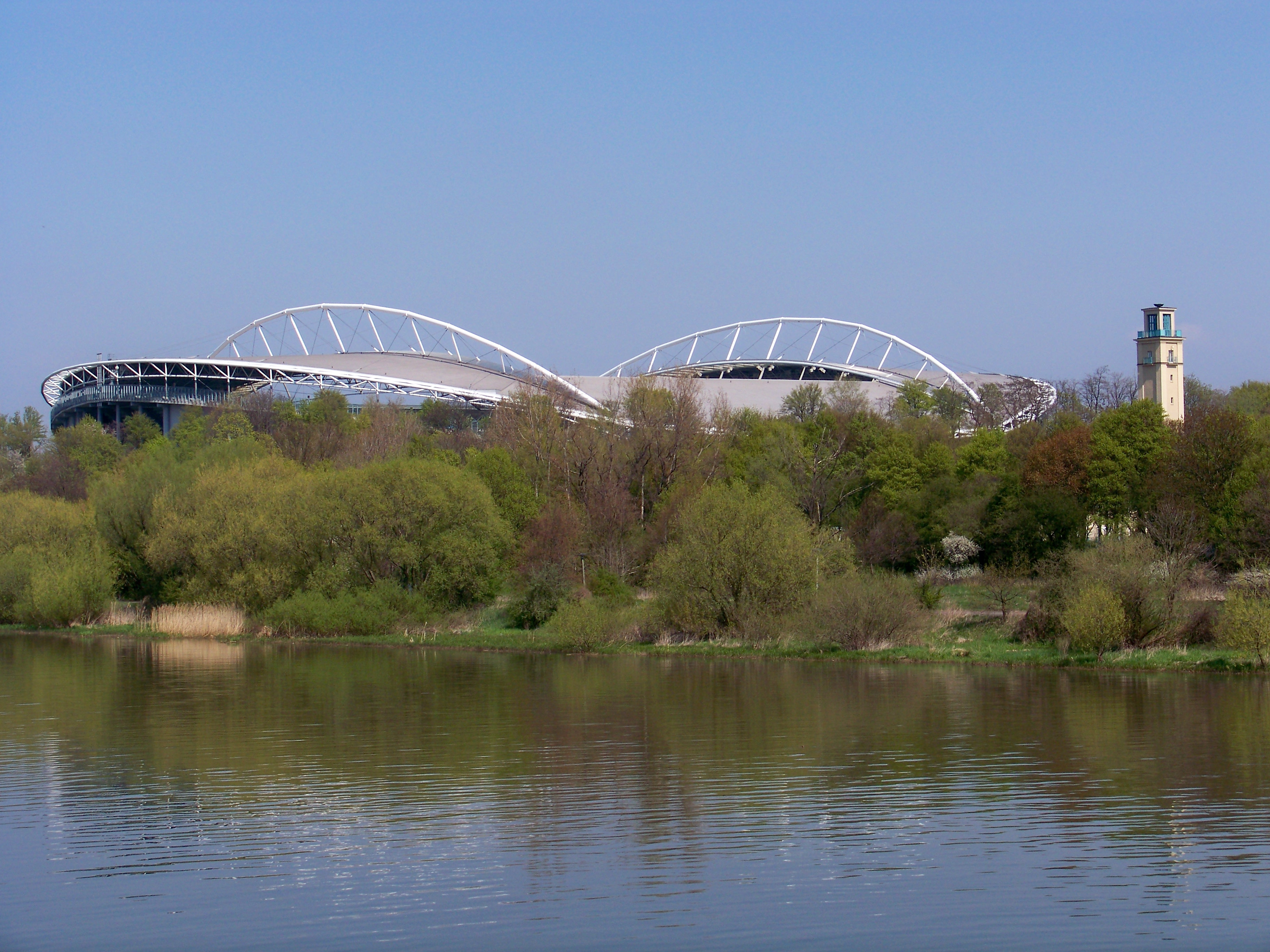 Zentralstadion in Leipzig von der Zeppelinbrücke aus gesehen